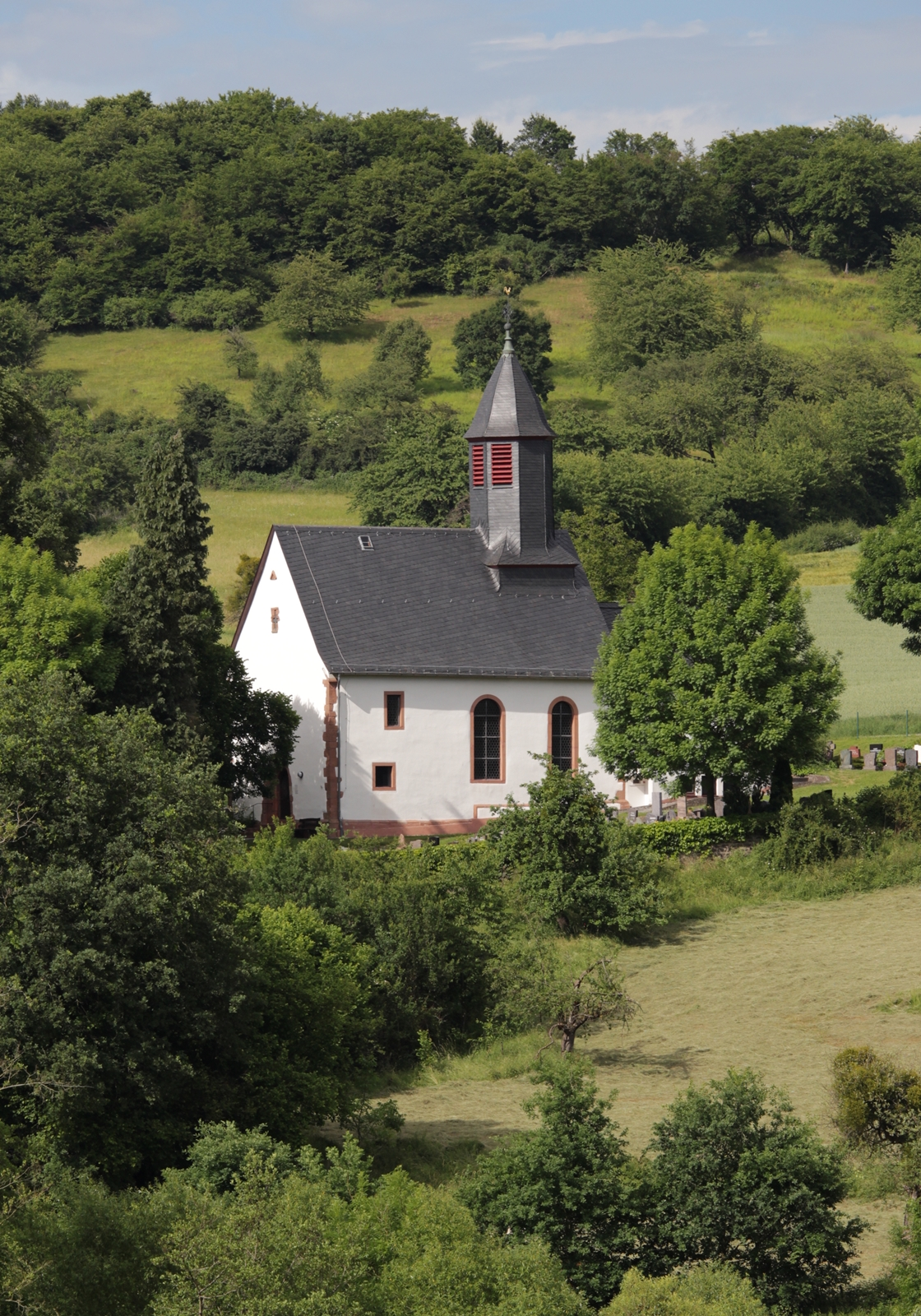 Evangelische Kirche Eichelsdorf, Nidda, Hessen, Deutschland